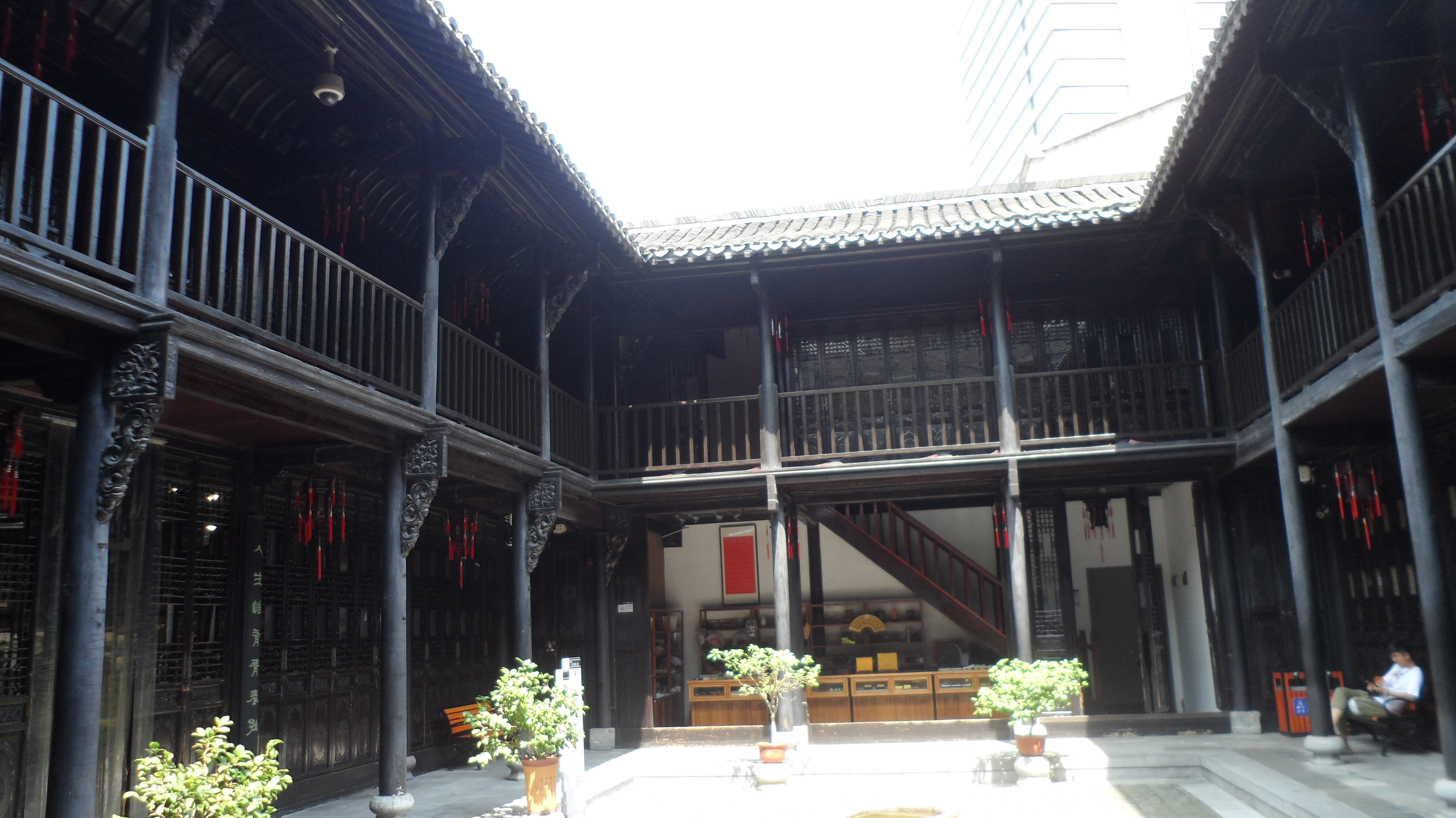 Former Residence of Li Hongzhang